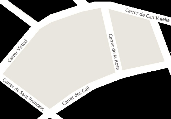 Barrio Judio de Inca, definición